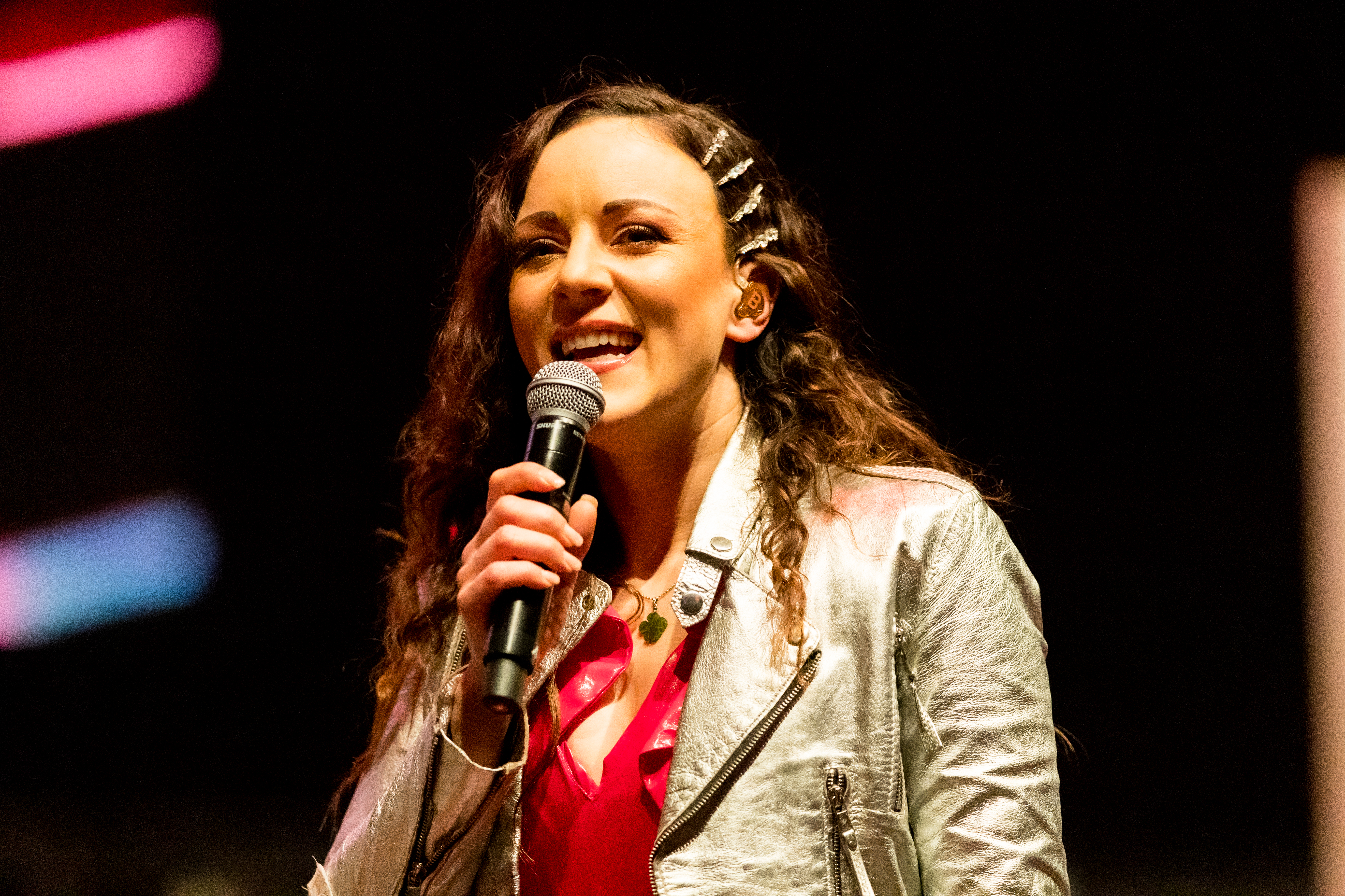 Blümchen during Sunshine Live - Die 90er Live on Stage at Maimarkthalle & Maimarktclub, Mannheim, Baden-Württemberg, Germany on 2019-12-01, Photo: Sven Mandel